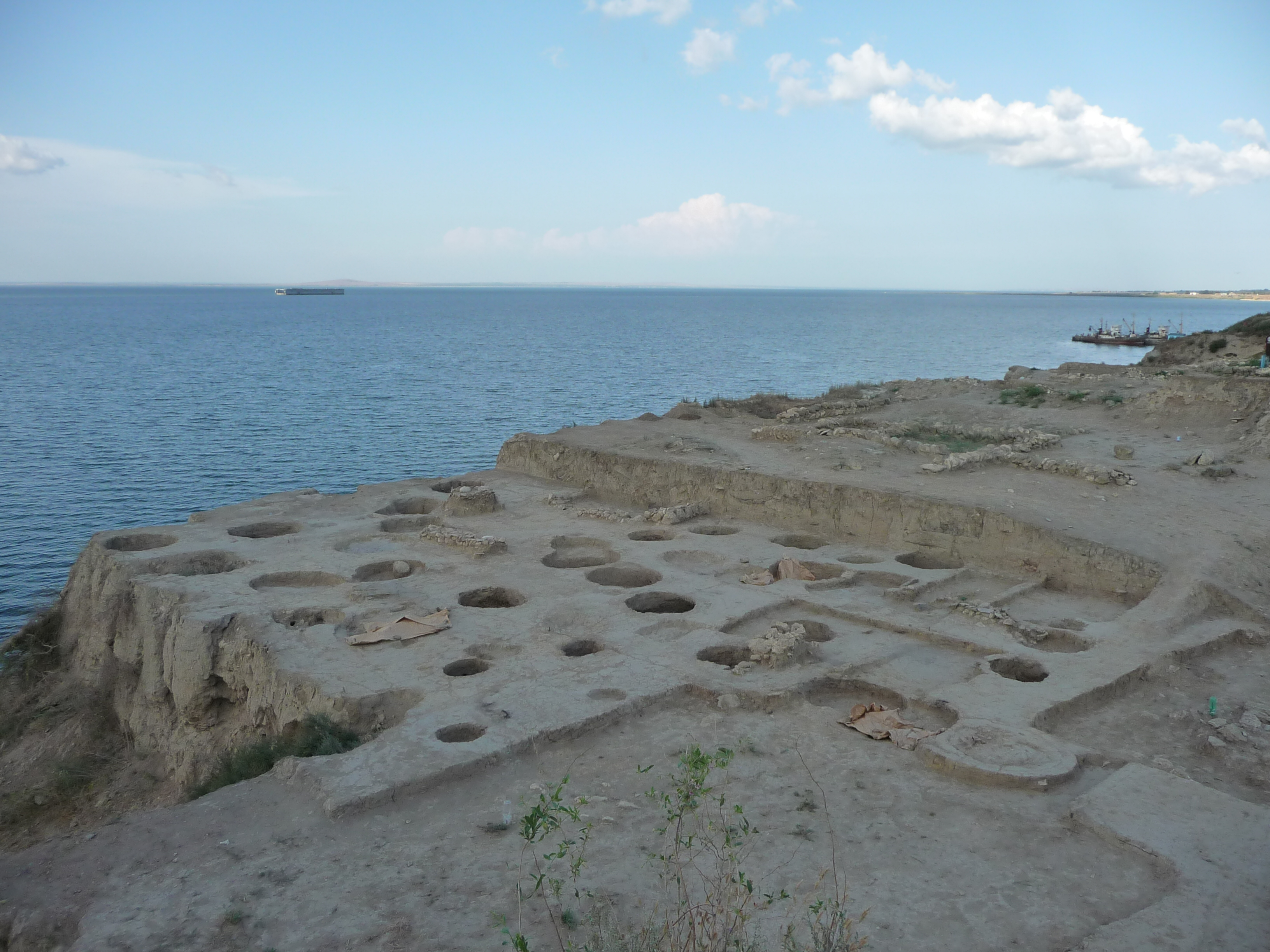 Раскопы Германассы